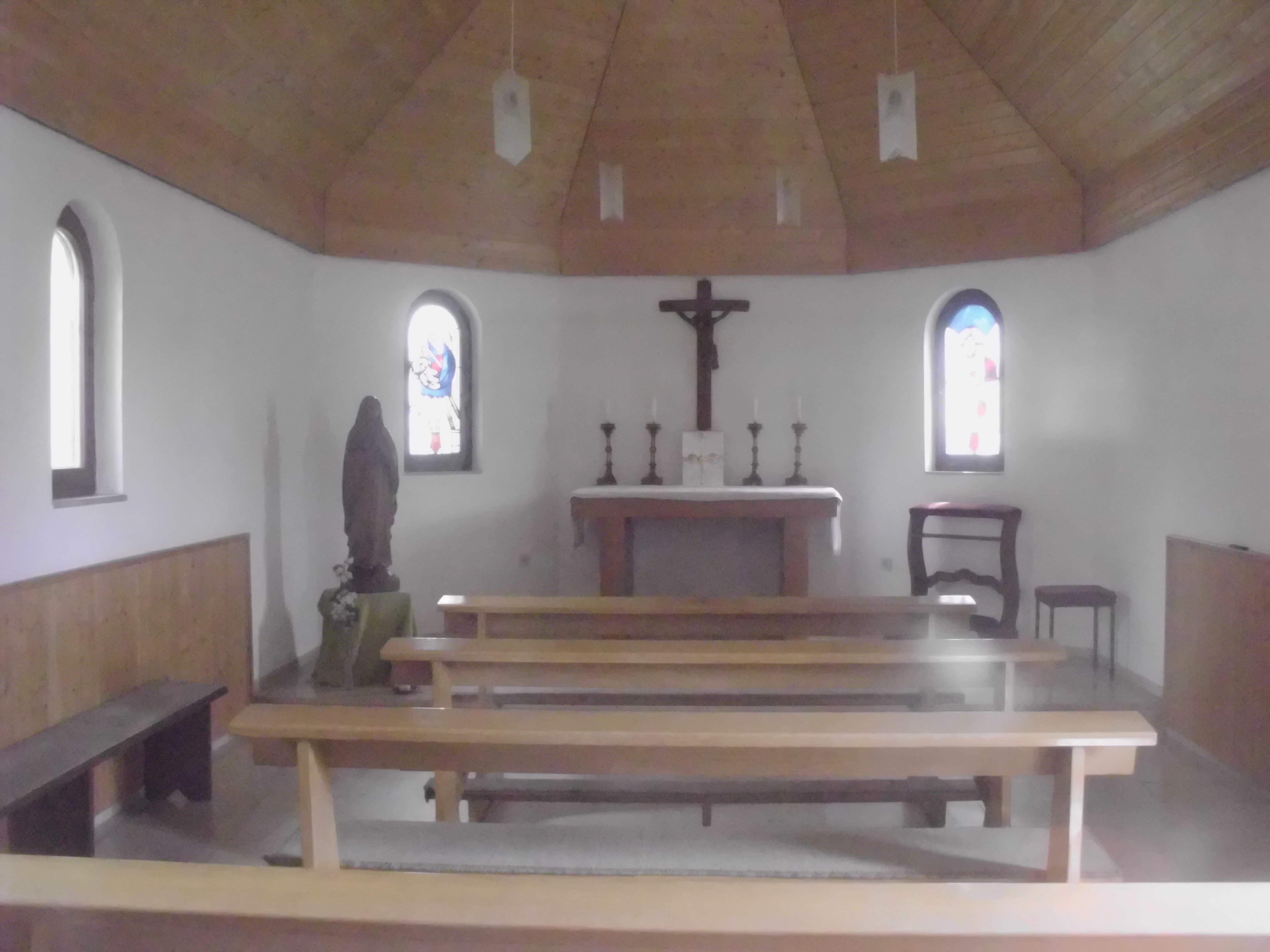 Inneres der Ortskapelle von Kauerlach, Ortsteil von Hilpoltstein im mittelfränkischen Landkreis Roth